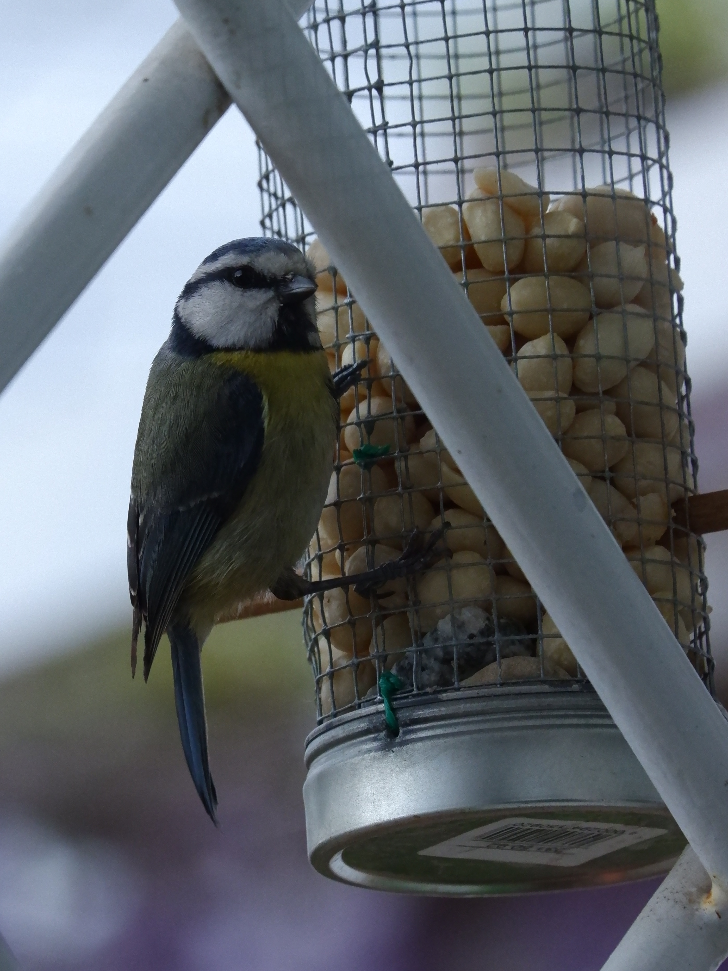 Mallarenga blava a la finestra de casa meva . Barberà del vallès . BCN. 2020